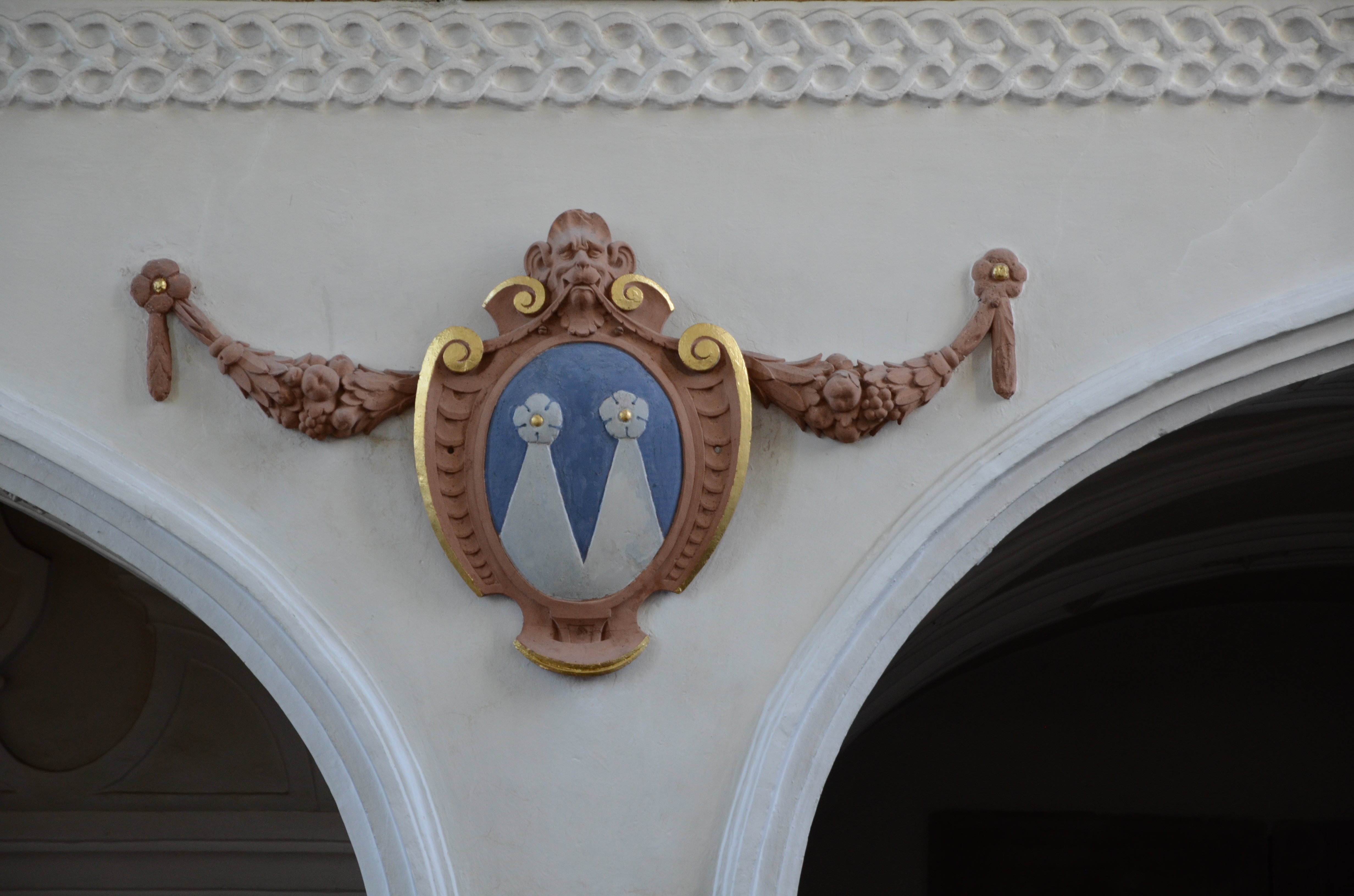 evang.-luth. Dreifaltigkeitskirche in Haunsheim